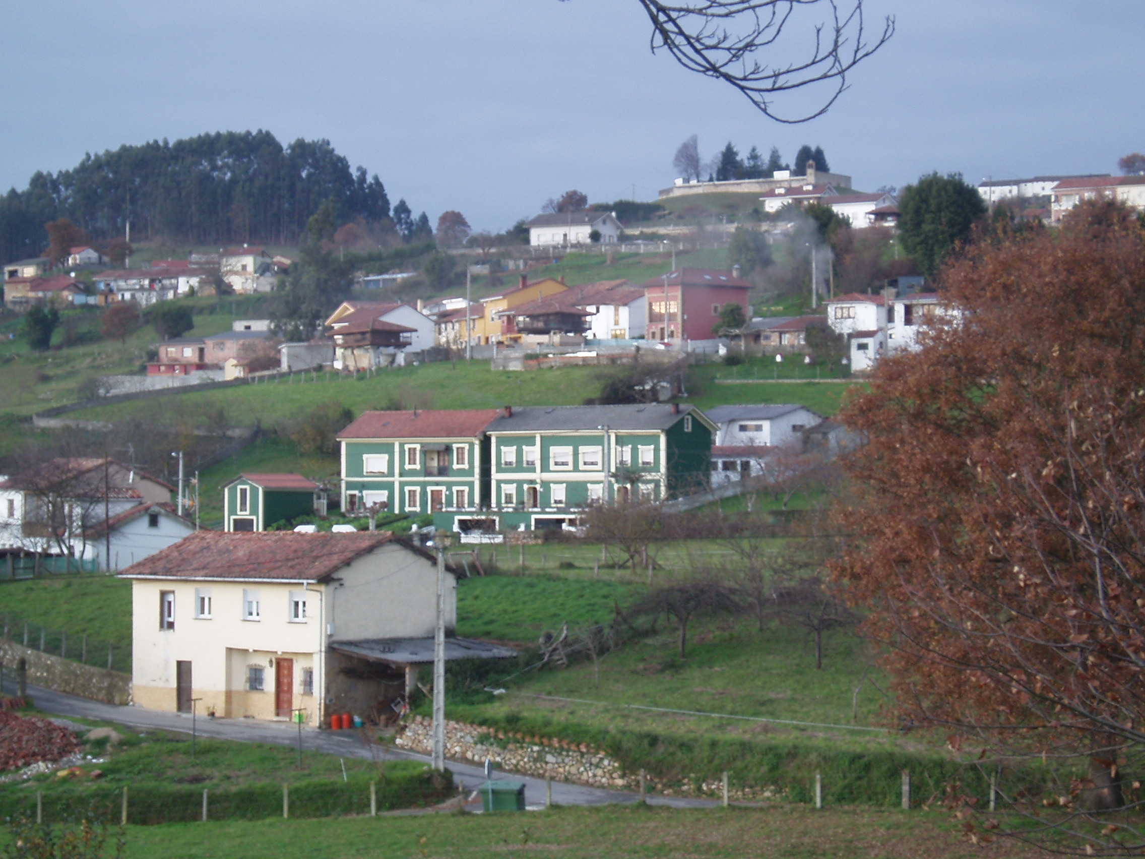 Vista del pueblo de Collado (Siero)